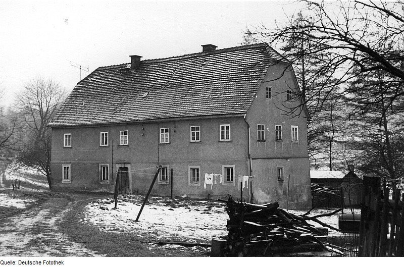 Original image description from the Deutsche Fotothek Tharandt-Grillenburg. Ehem. Mühle